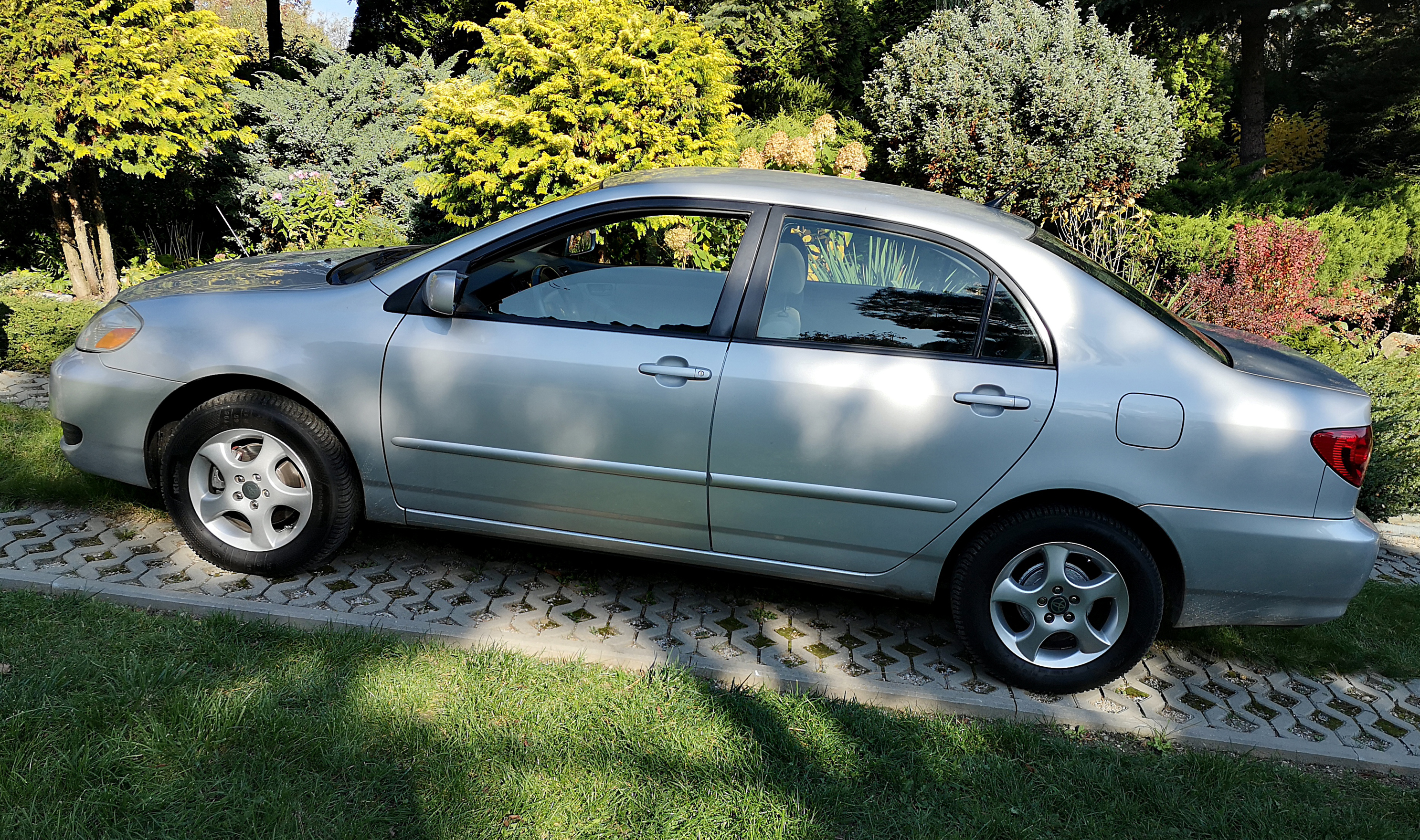 Toyota Corolla E130, wersja z rynku USA